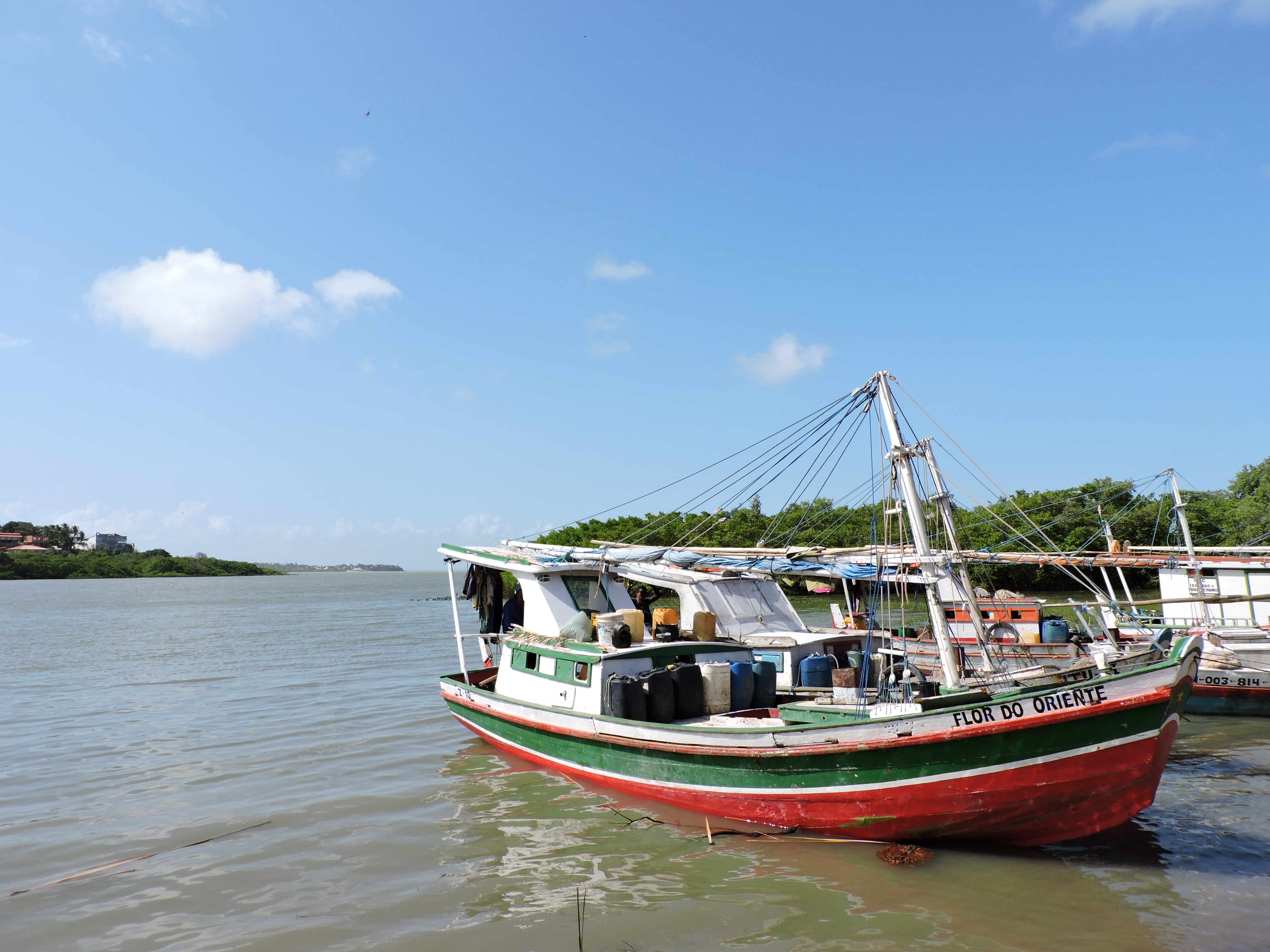 fotos tiradas no bacanga